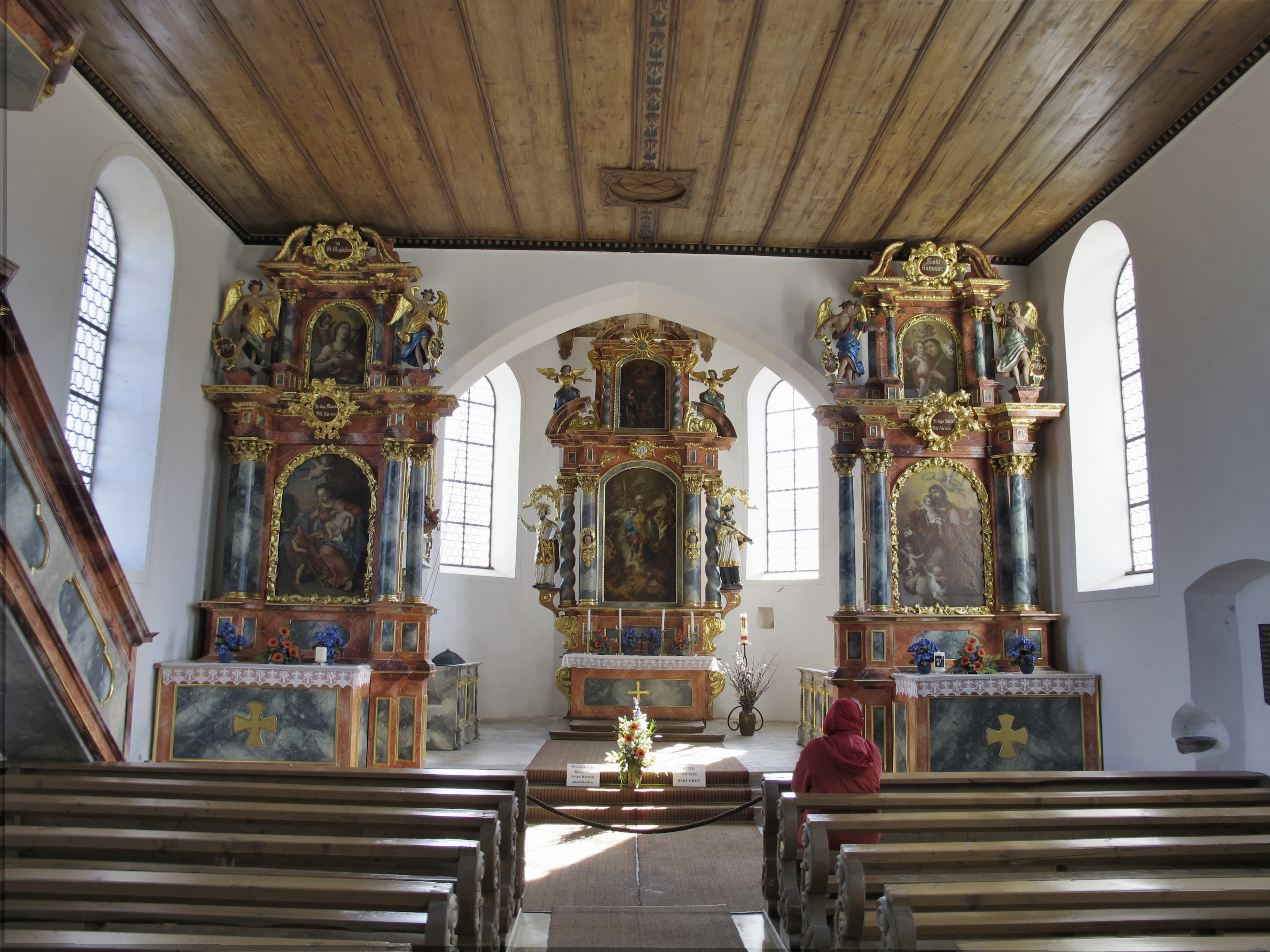 Burgkirche St. Michael in Schöllang bei Oberstdorf: die drei Altäre